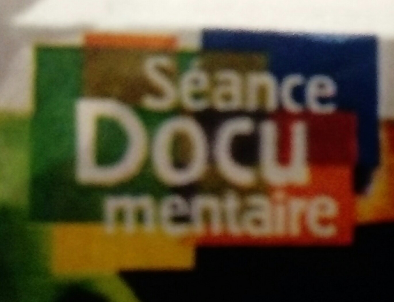 Logo de la case Séance Documentaire sur Canal+ de 2003 à 2009.